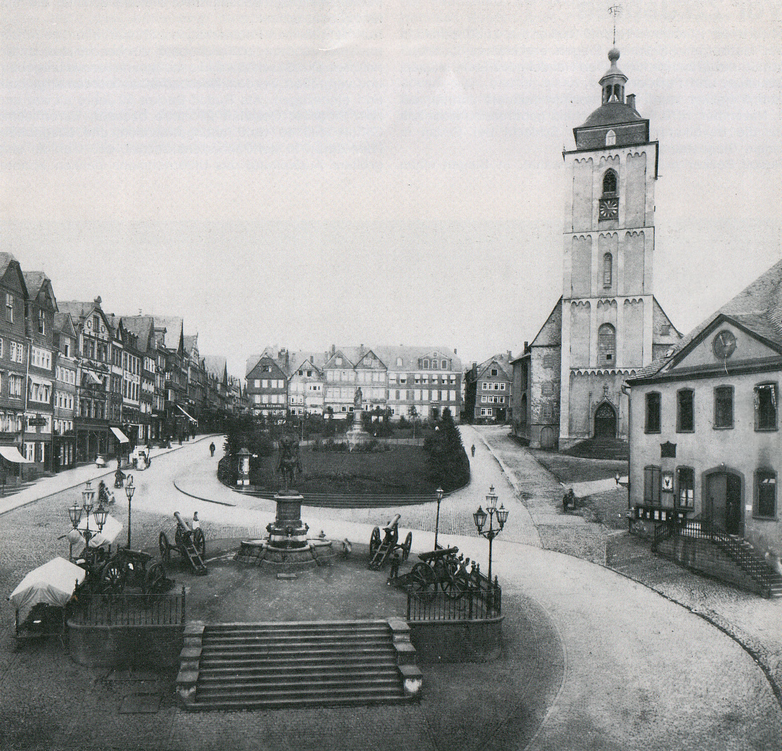 75 JAHRE MIT BECKER SIEGEN. Jubiläumsschrift der Pelzwarenfabrik Becker KG, Siegen. Foto der Siegener Altstadt zur Zeit der Geschäftsgründung (1895).